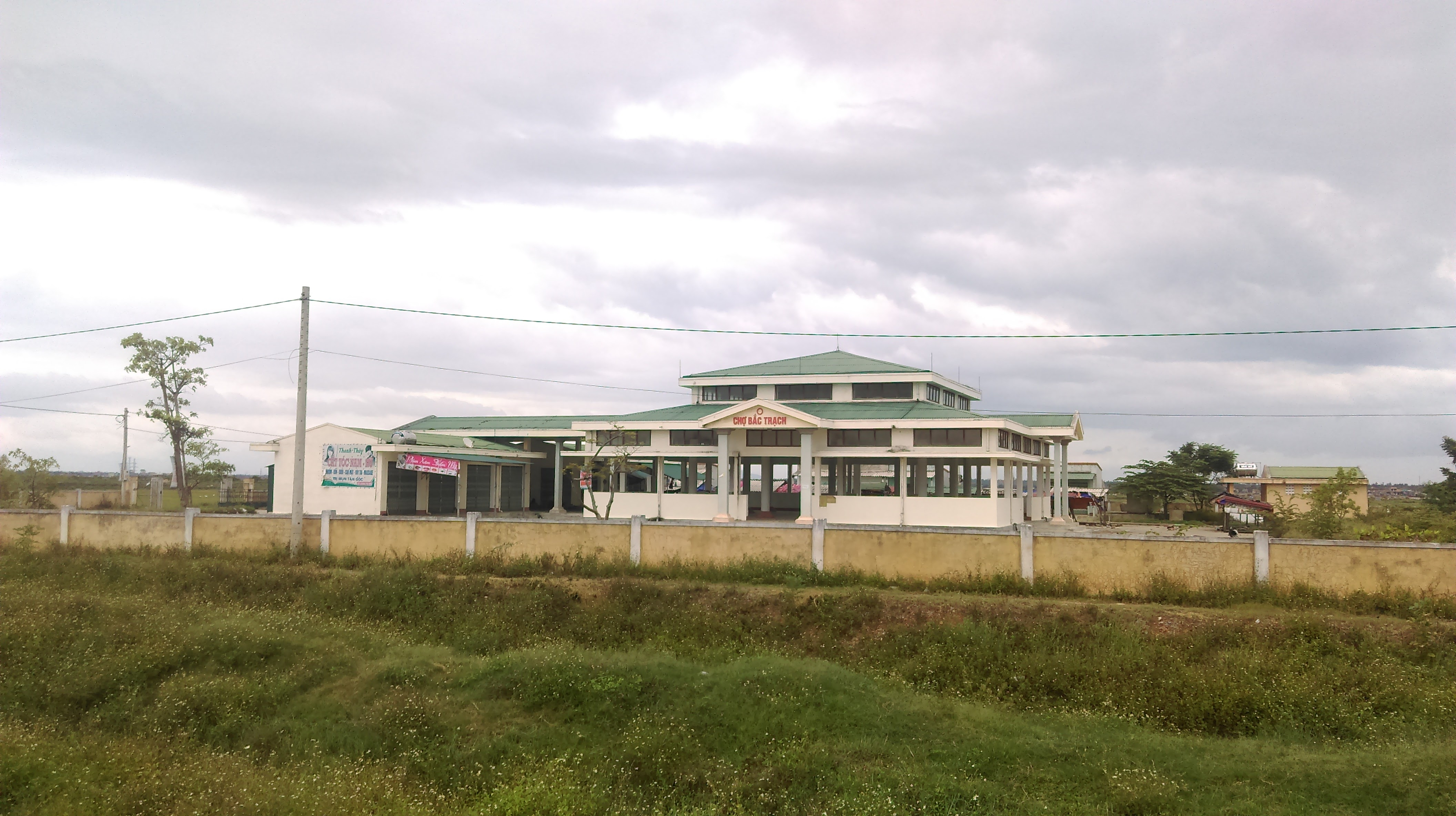 Chợ Bắc Trạch, Bố Trạch, Quảng Bình